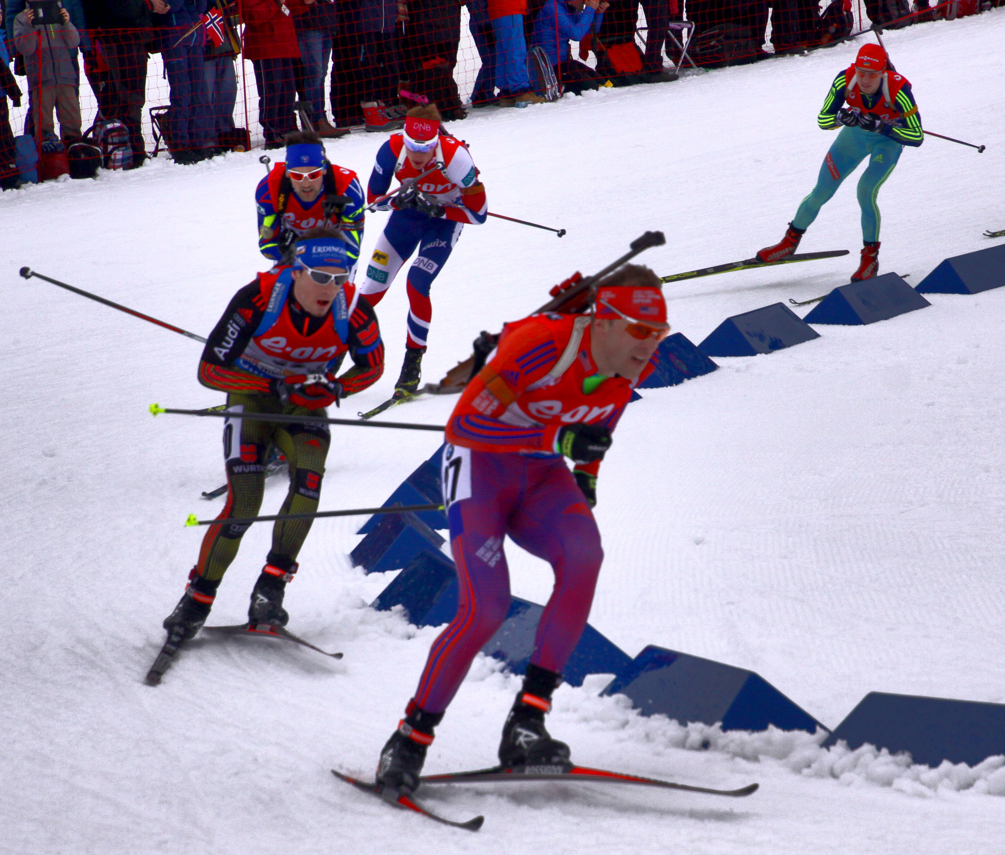 Oslo. Aux championnats du monde de biathlon.